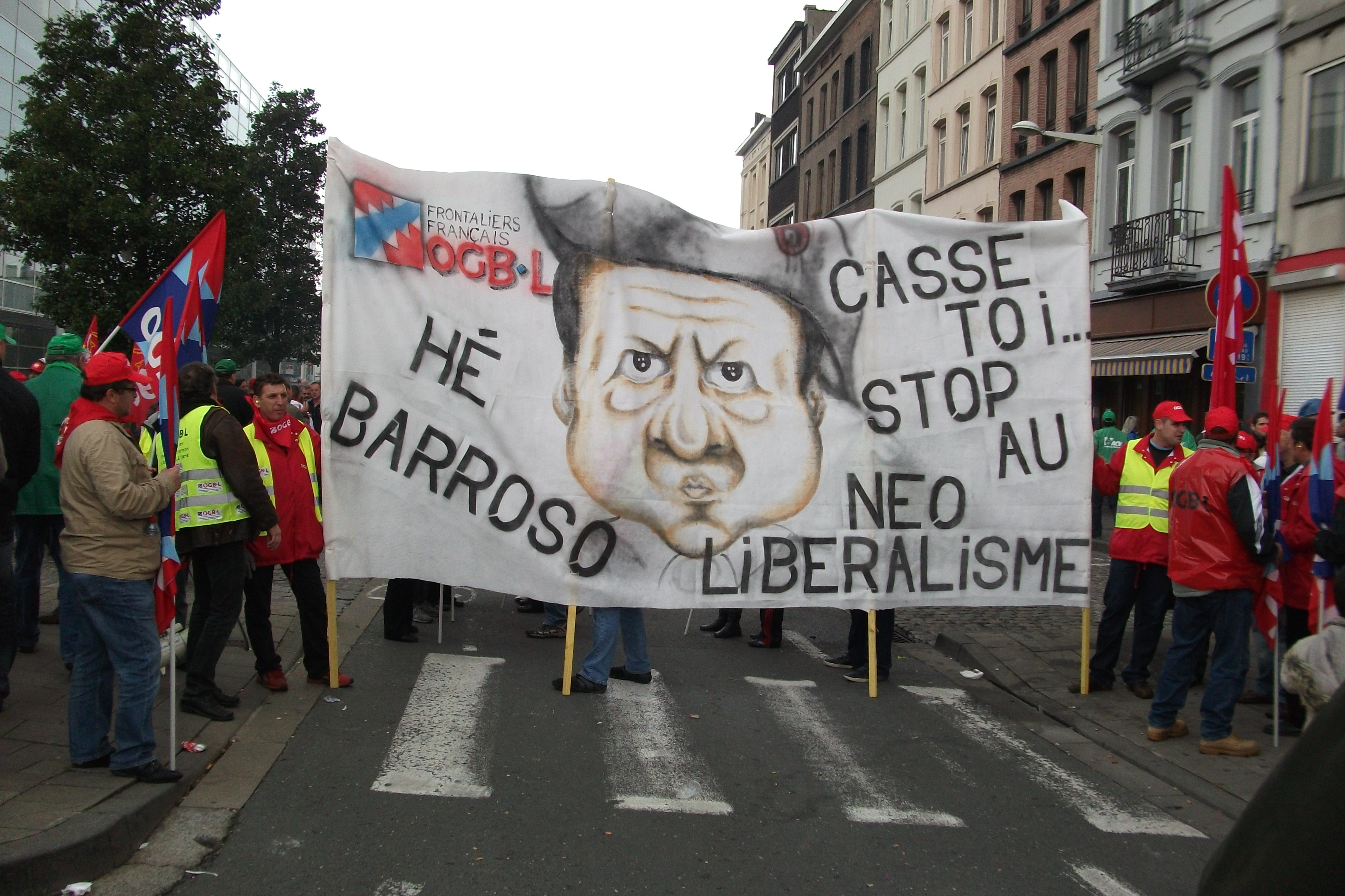 Grève européenne 2010 à Bruxelles, les transfrontaliers de l' OGB-L et Barroso.